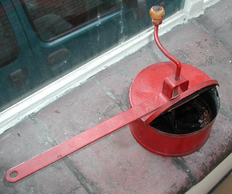 Gerät zum Rösten von Kaffee für Zuhause.